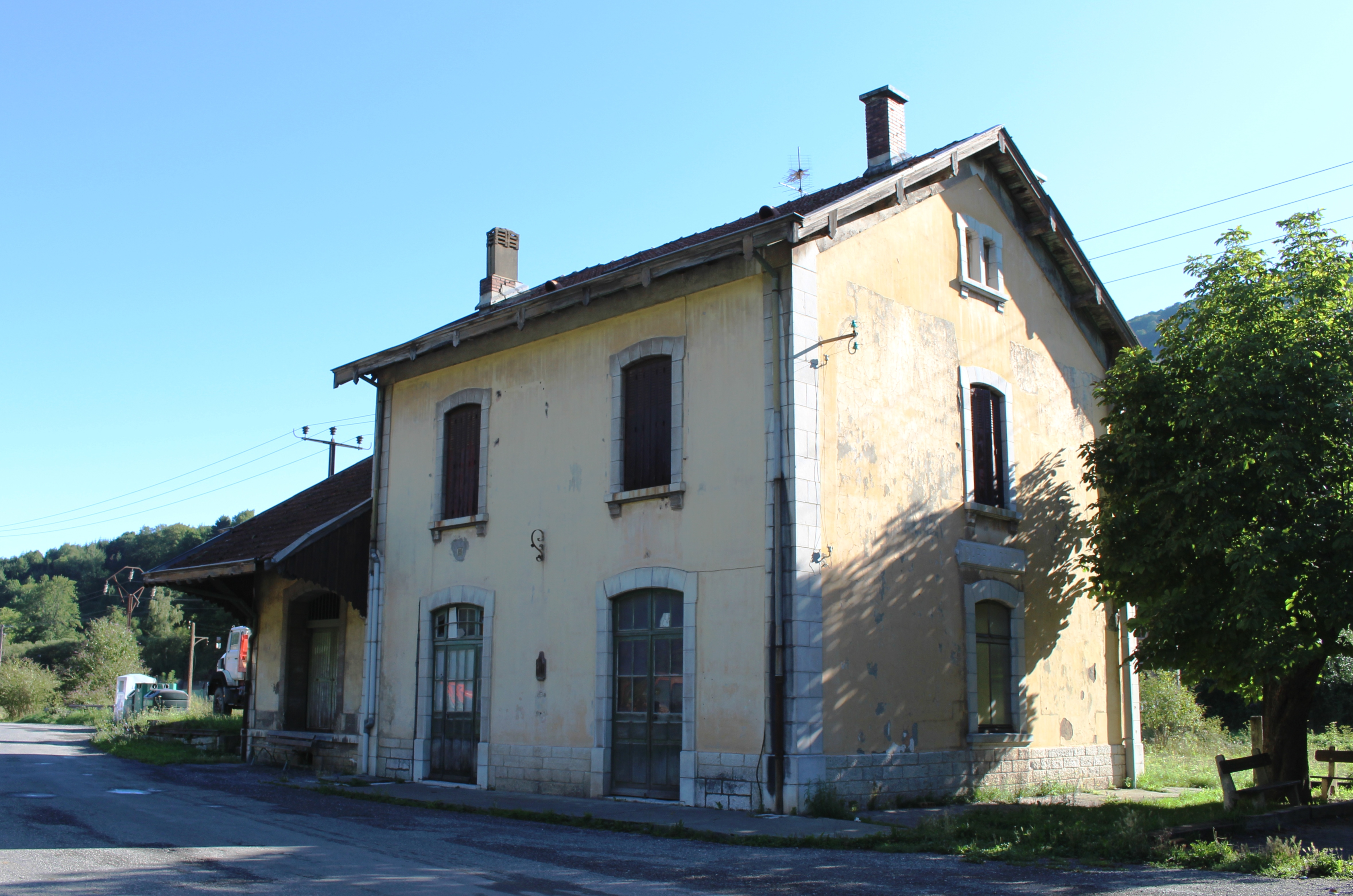 Gare de Sarrancolin (Hautes-Pyrénées)